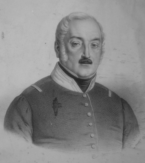 Retrato de J.C. Thiébaut realizado por el fotógrafo y pintor francés Alfonso Fermepin.